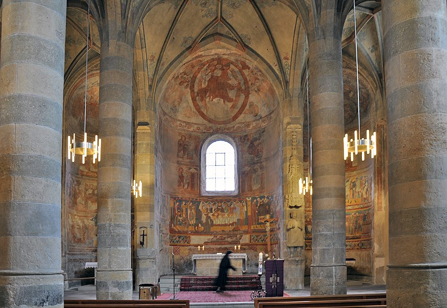 Inneres der Klosterkirche Müstair